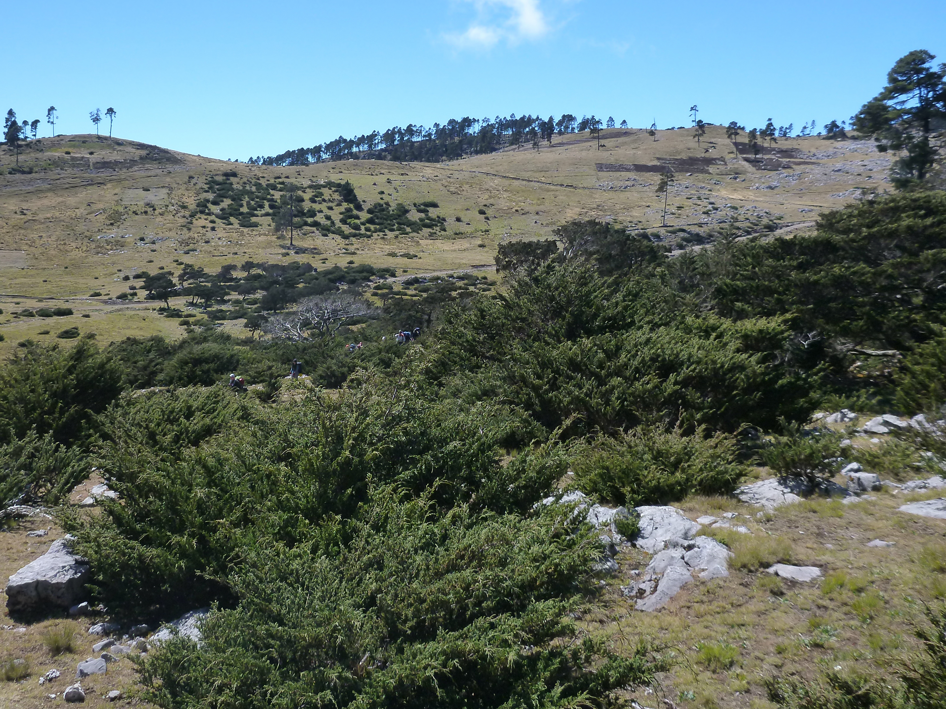 Juniperus standleyi, Todos Santos Cuchumatán, Guatemala.